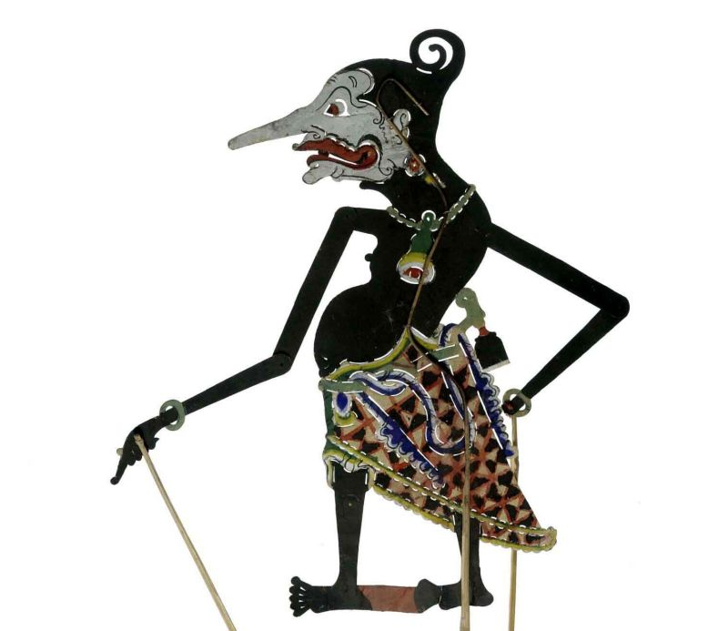 Wajangfiguur. Papieren wayangpop, voorstellende Petruk (kinderspeelgoed)